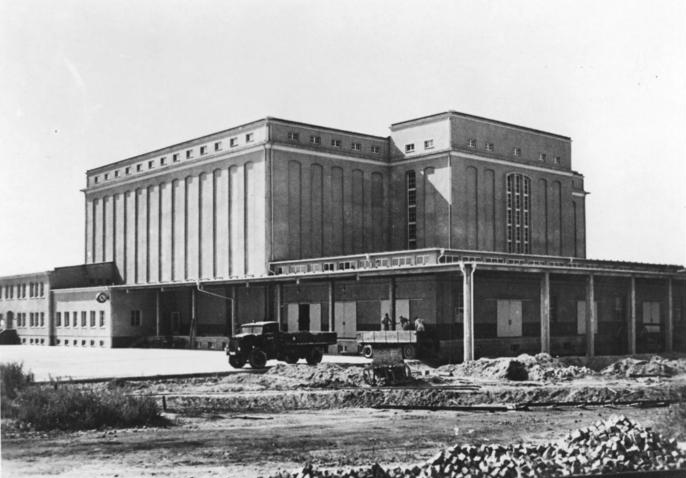 Dresden, Kühlhaus Zentralbild Höhne-Pohl 24.9.1953 Das erste Standard-Kühlhaus in der Deutschen Demokratischen Republik In Dresden auf dem Schlachthofgelände wurde in einer Bauzeit von einem Jahr das erste Standard-Kühlhaus der Deutschen Demokratischen Republik fertiggestellt. Das Kühlhaus ist mit den neusten technischen Einrichtungen ausgestattet. In einem Gefriertunnel mit 25-30 Grad unter Null und in Schnellgefrierhallen wird das Frischfleisch in einem Tag eingefroren, während bisher fünf bis sechs Tage gebraucht wurden. In den Lagerhallen bis zum fünften Stock, in denen zwei bis drei Grad unter Null sind, liegen große Mengen von Schmalz und Talg, die in letzter Zeit aus der Sowjetunion geliefert wurden.